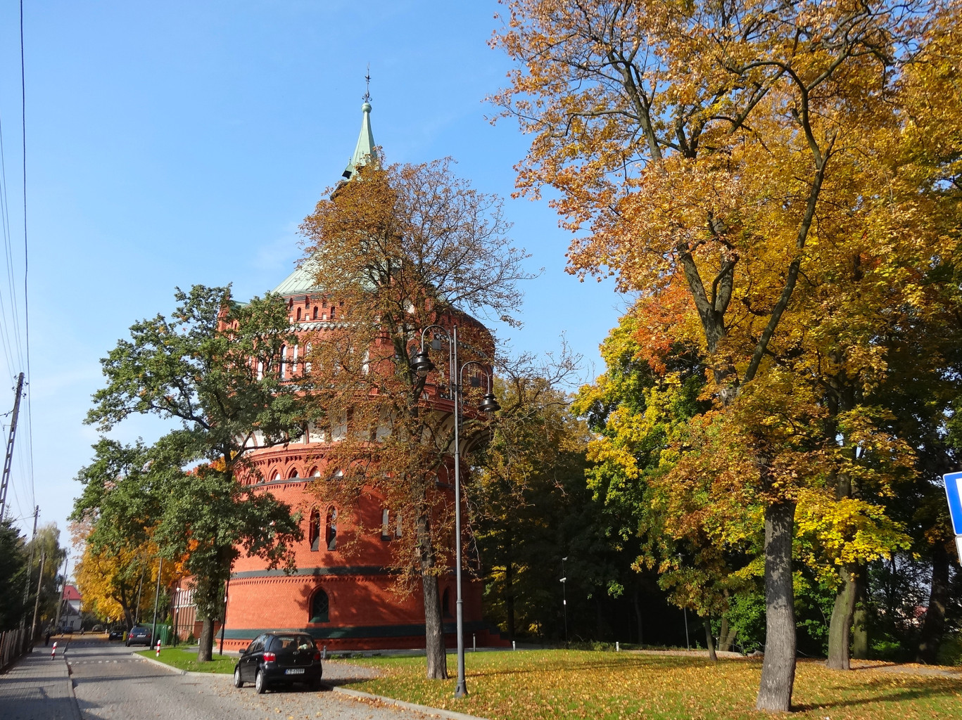 Wieża ciśnień w Bydgoszczy przy ul. Filareckiej, zbud. w 1900 roku, mieści Muzeum Wodociągów i Kanalizacji, a na szczycie galerię widokową